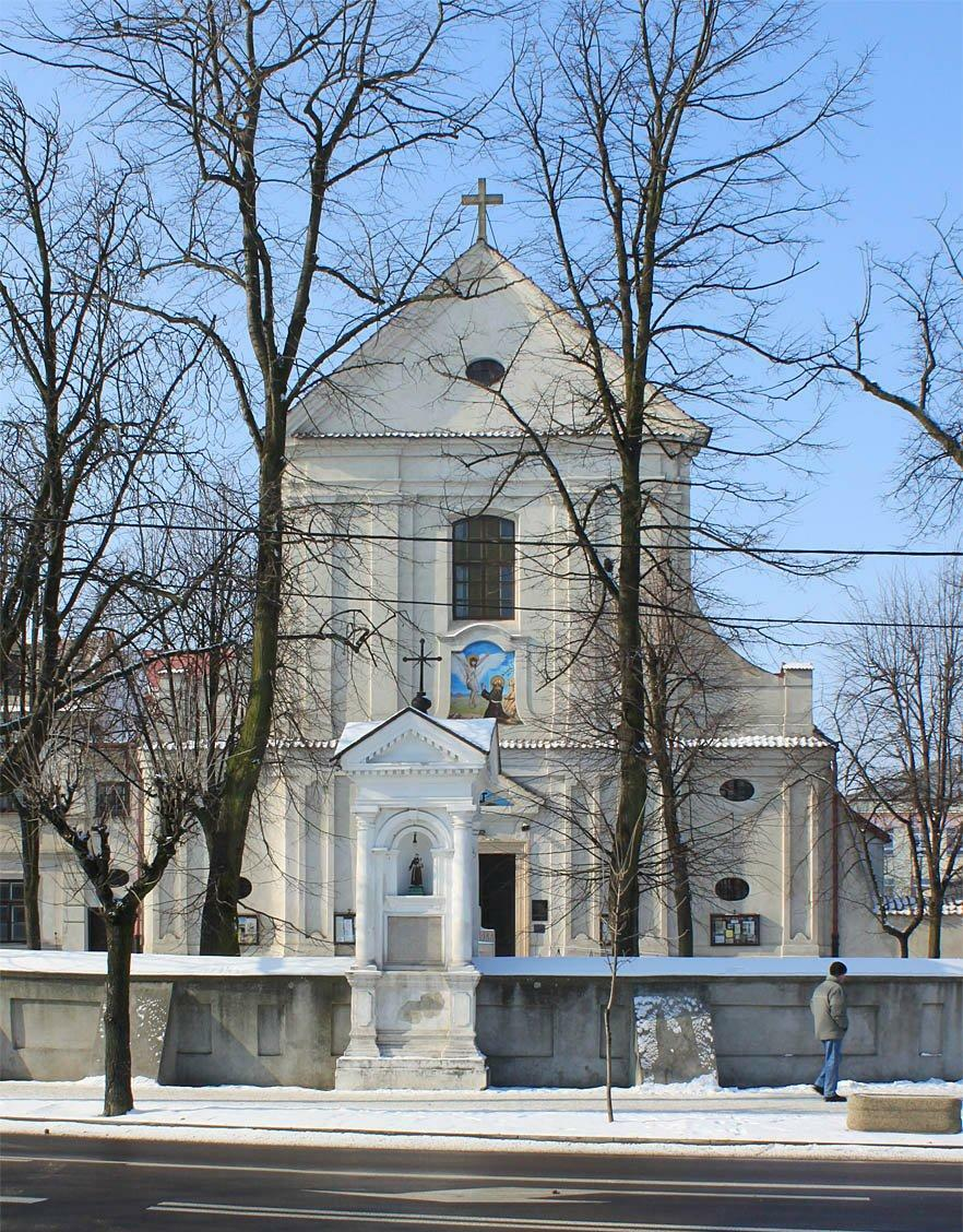 Lubartów - kościół p.w. św. Wawrzyńca, 1741, XIX